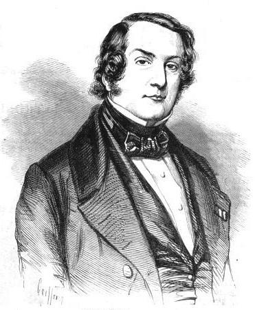 Tanneguy Duchâtel